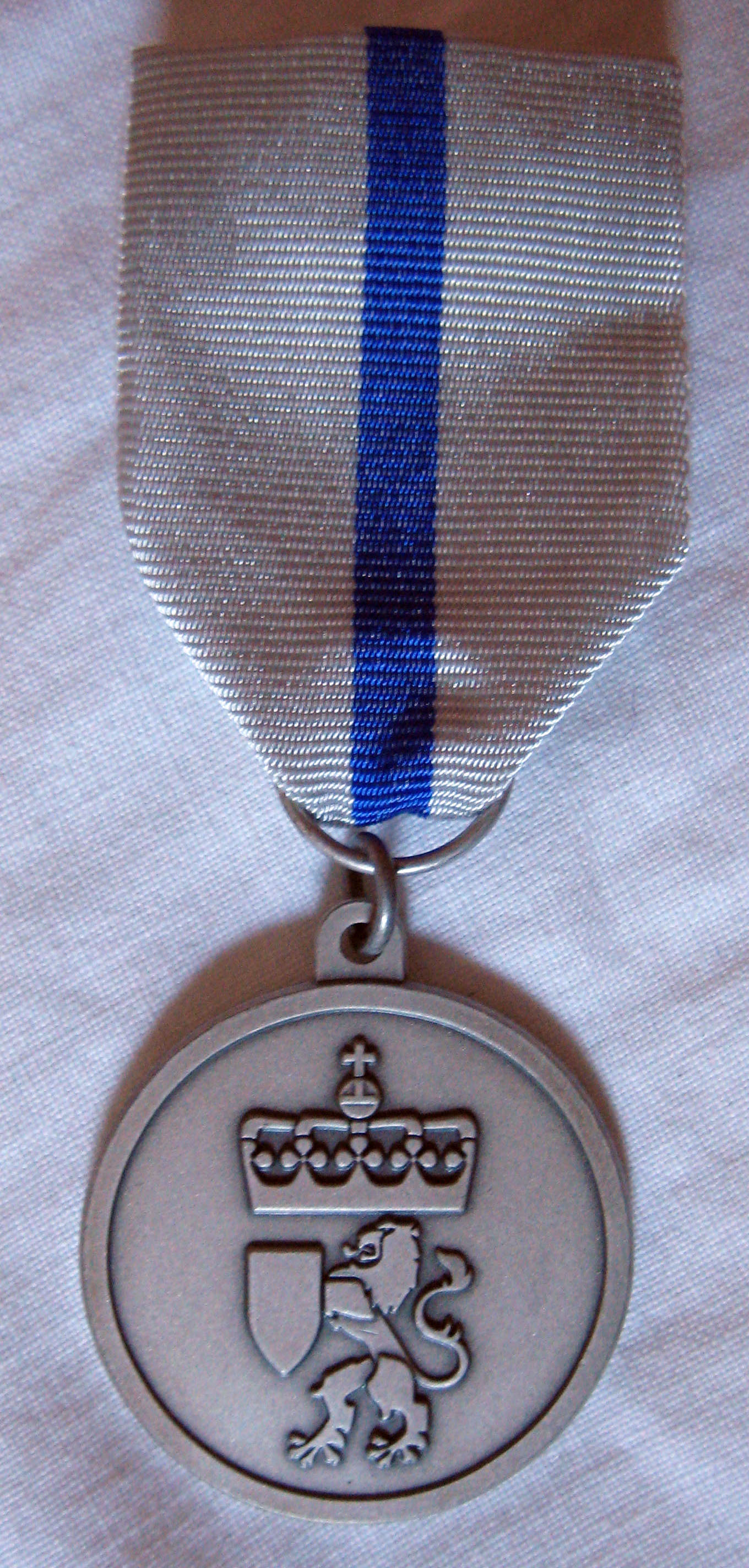 Норвежская медаль "За службу в Гражданской обороне"